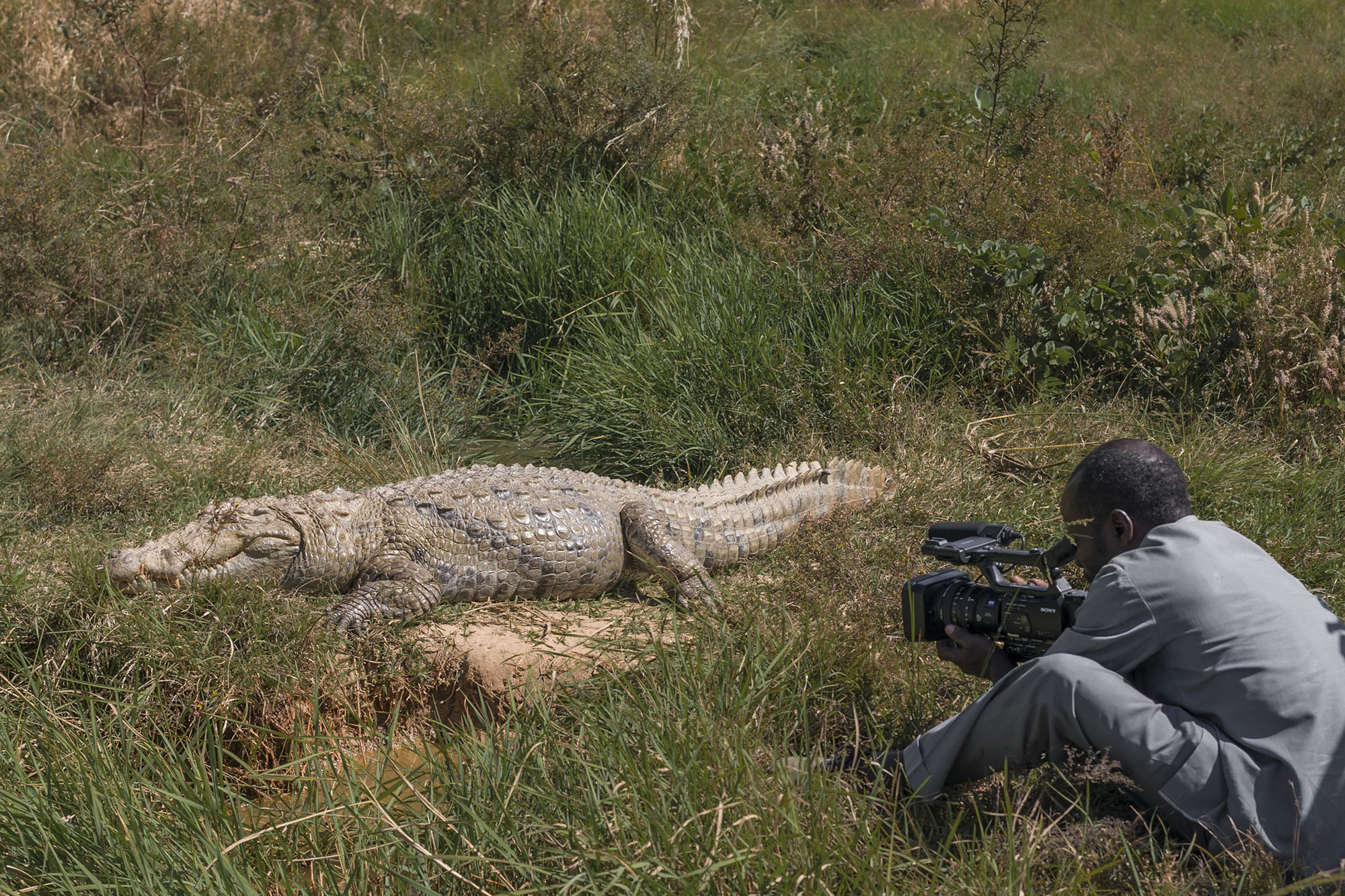 Un cameraman burkinabè s'approche d'un crocodile sacré de Bazoulé pour effectuer un gros plan de l'animal. This is an image of "African people at work" from Burkina Faso